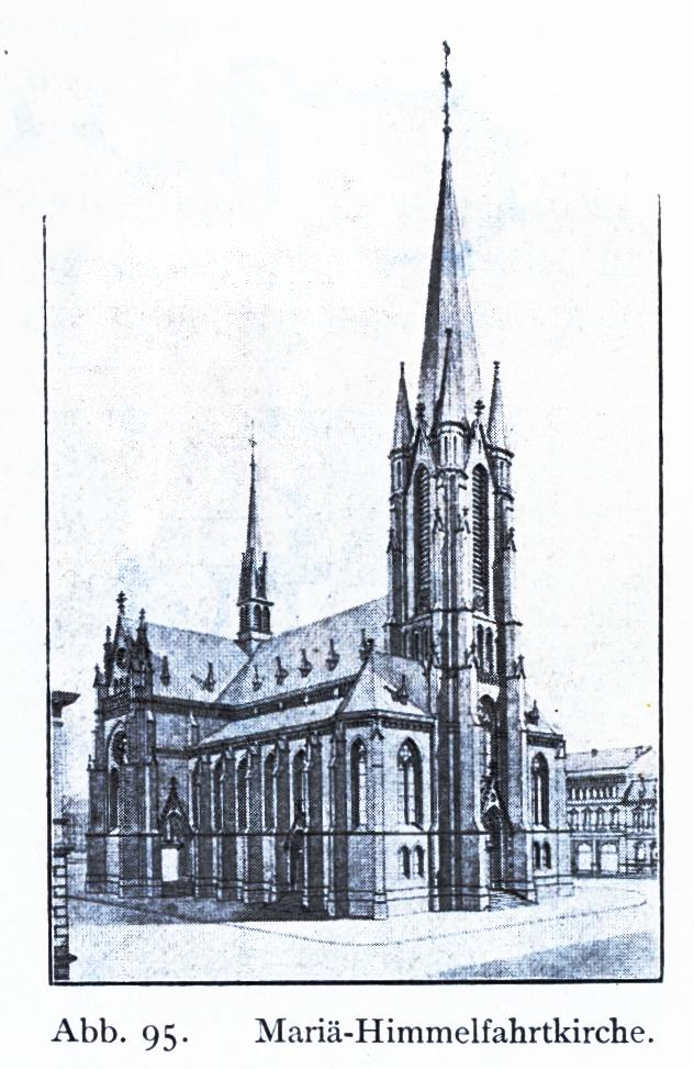 katholische Pfarrkirche St. Mariä Himmelfahrt in Düsseldorf-Flingern, erbaut 1890-1892 von Architekt Caspar Clemens Pickel